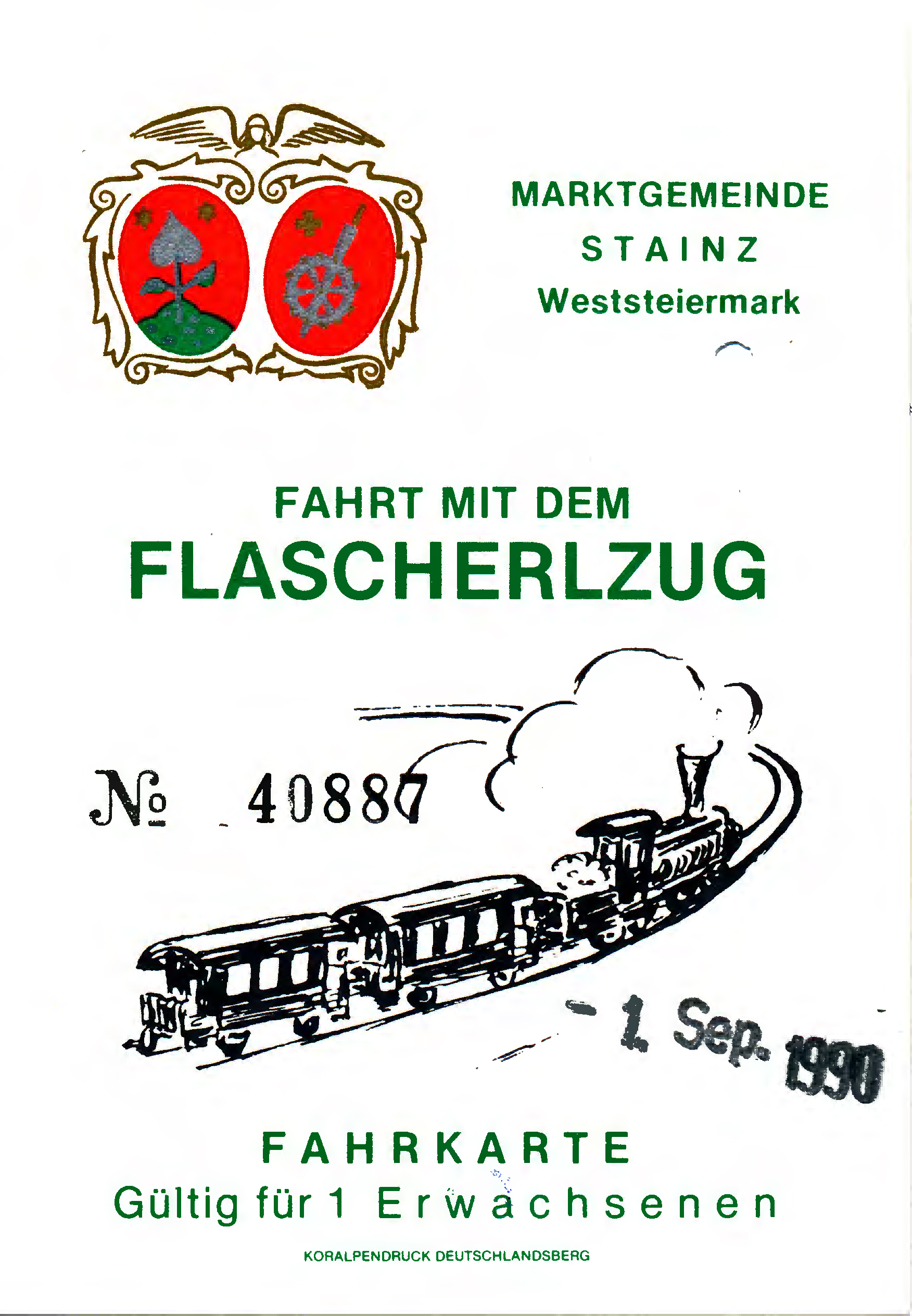 Flascherzug; am 1. September 1990 abgefahrener Fahrschein (Nr. 40887). (Entwertet mit Schaffnerzange: Rundlochung unterhalb des Aufdrucks Weststeiermark zu erkennen.)